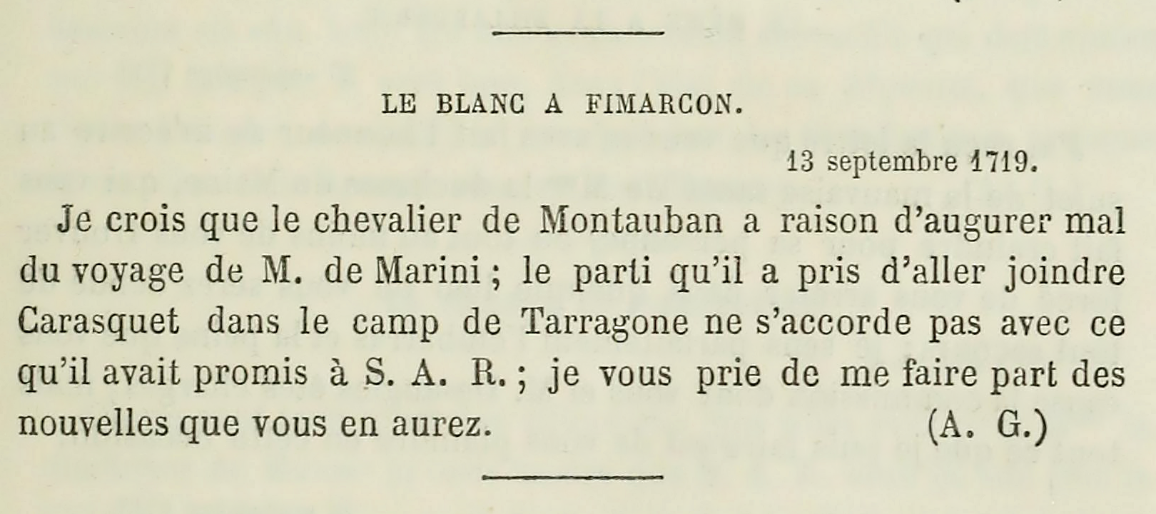 Lettre de Claude Le Blanc (ministre de la guerre) écrite le 13 septembre 1719 et destinée à Jacques de Cassagnet, Marquis de Firmacon (Lieutenant-Général des armées du roi & commandant en Roussillon). Elle provient des archives de la Bastille en France. Il y est question de la Guerre de la Quadruple-Alliance et du chevalier de Montauban (brigadier des armées du roi, chevalier de Saint-Louis, gouverneur des ville, viguerie et citadelle de Seyne), et de la visite du comte de Marini (agent double italien au service du cardinal Alberoni qui est mis à la Bastille en 1726) au colonel Pere Joan Barcelo (alias Carasquet) en Espagne à Camp de Tarragone, et du régent de France le duc d'Orléans (ou de l'infant Louis XV, S.A.R.).